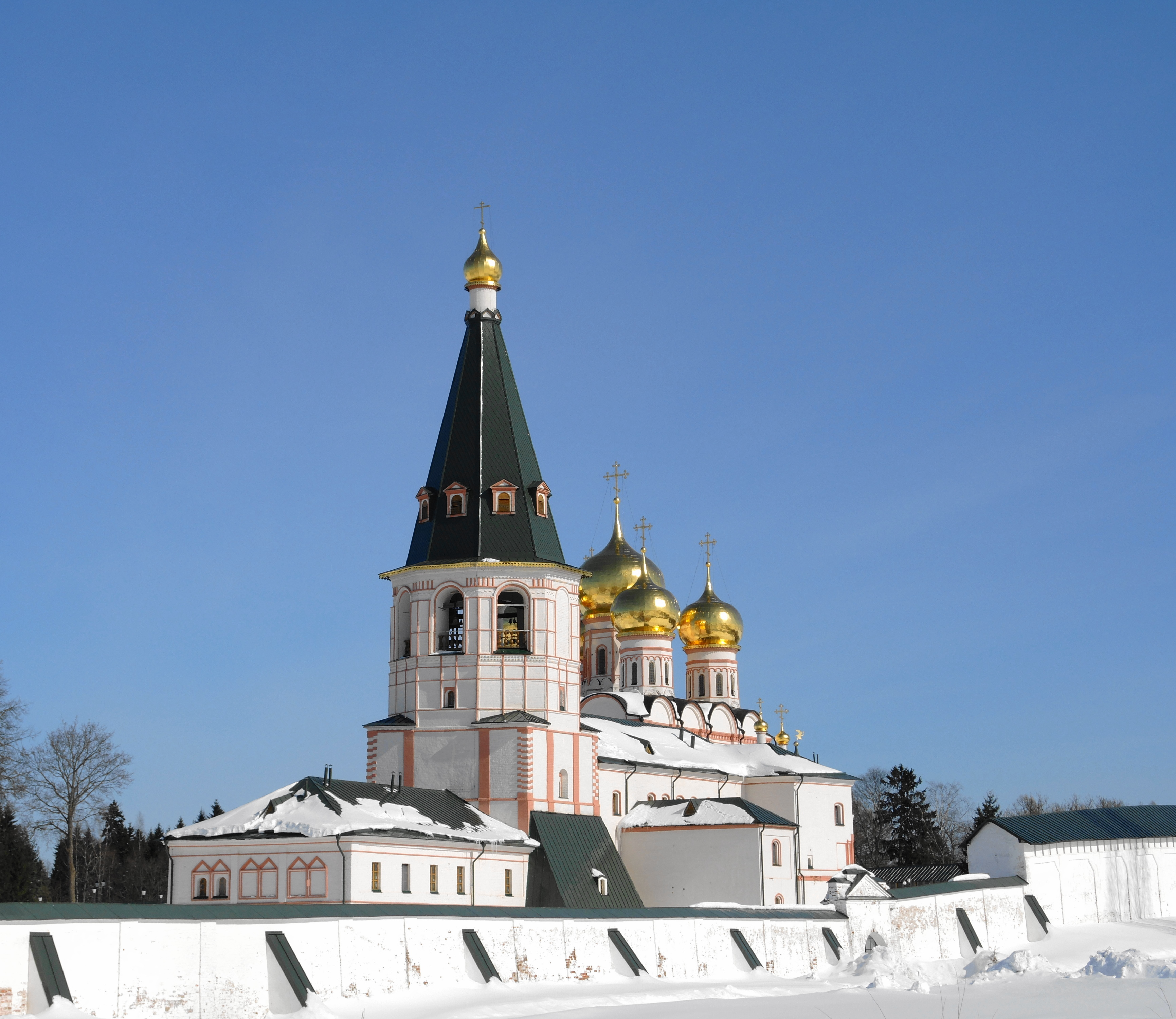 Ансамбль Иверского Богородицкого монастыря (Новгородская область, Валдай, остров Сельвицкий на оз. Валдайском)